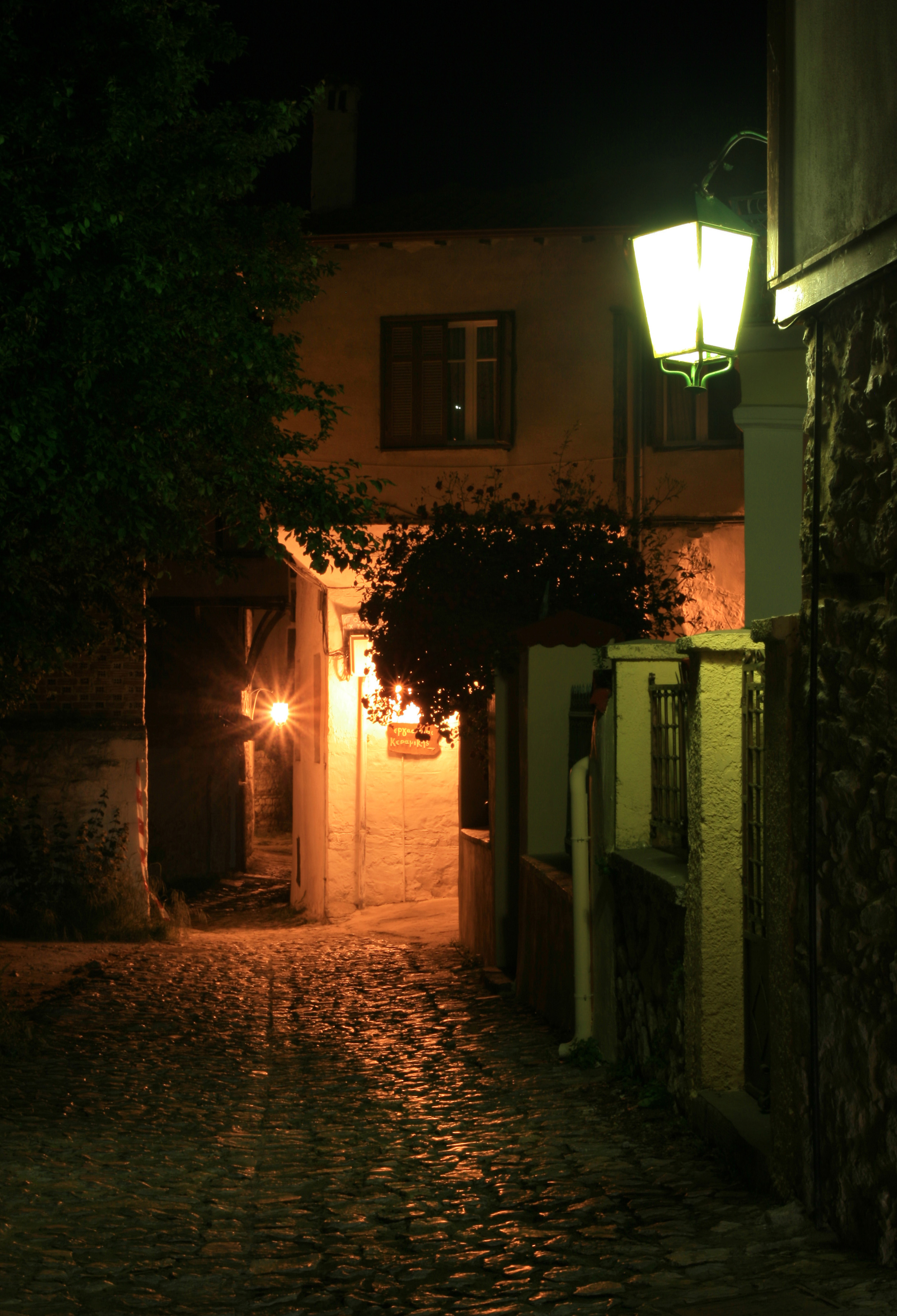 Συνοικία Ντόλτσο«Συνοικία Ντόλτσο»